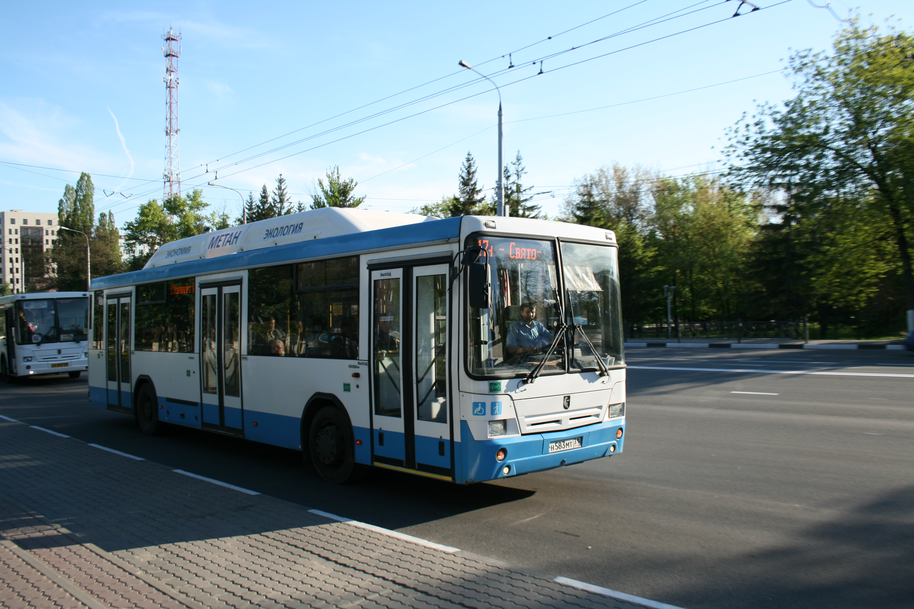 Белгородский автобус на проспекте Богдана Хмельницкого.